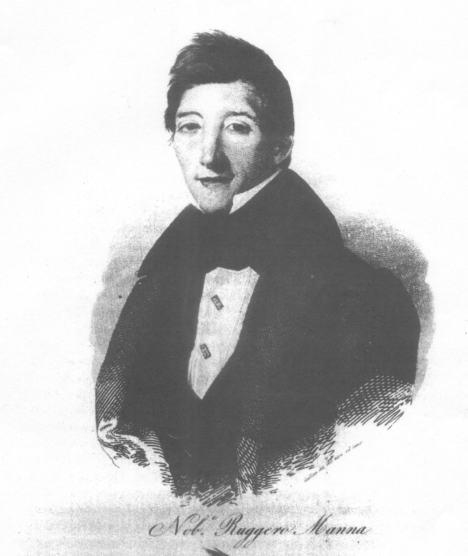 Ruggero Manna - Incisione a bulino di Luigi Gallina.